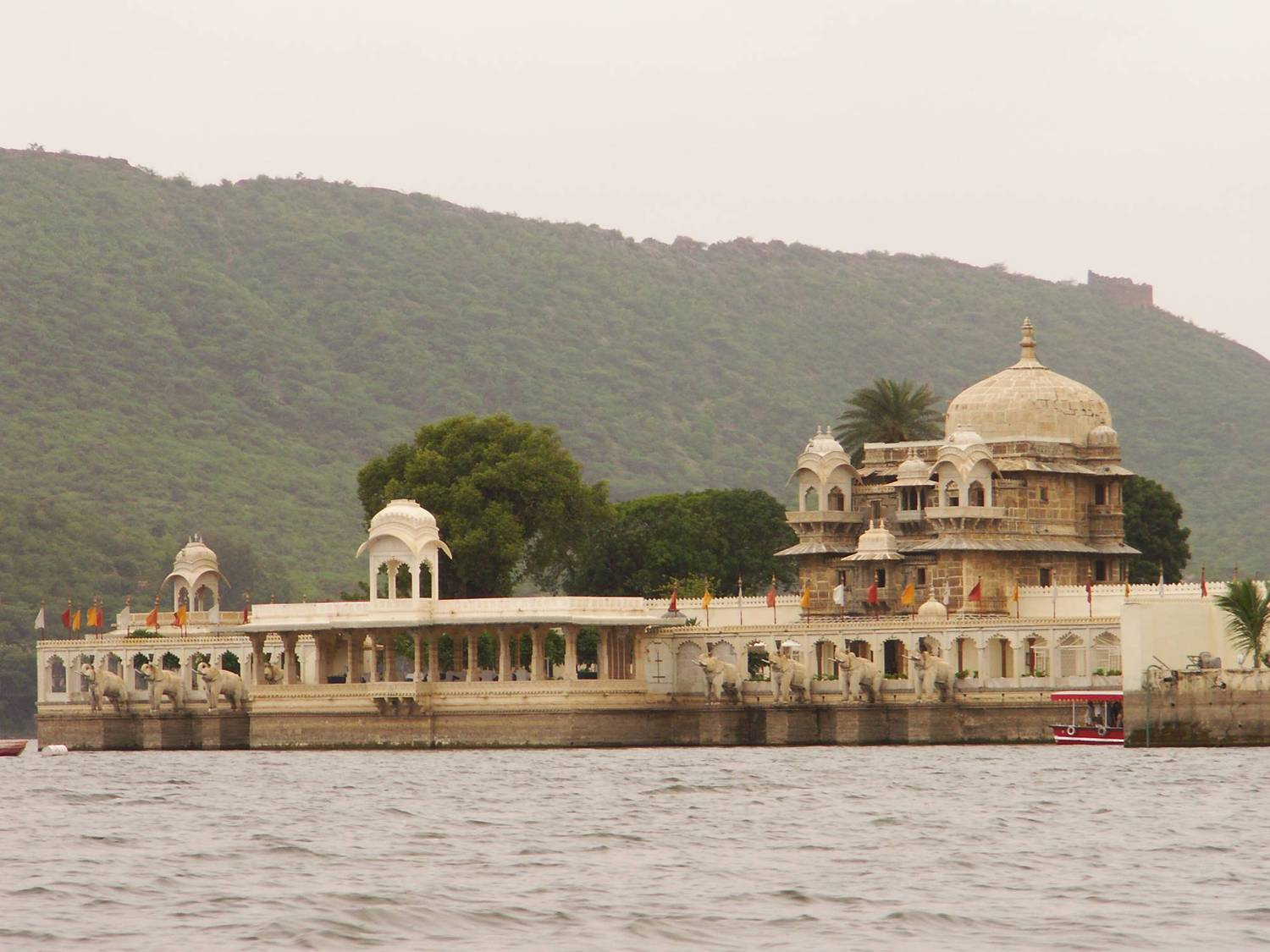 Palais Jag Mandir Lac Pichola Udaipur 2006 (Oeuvre personnelle)